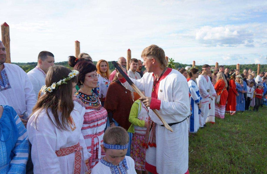 Kupala 2017 celebrated by the Union of Slavic Rodnover Communities (Союз Славянских Общин Славянской Родной Веры), in Krasotinka, Kaluga, Russia.